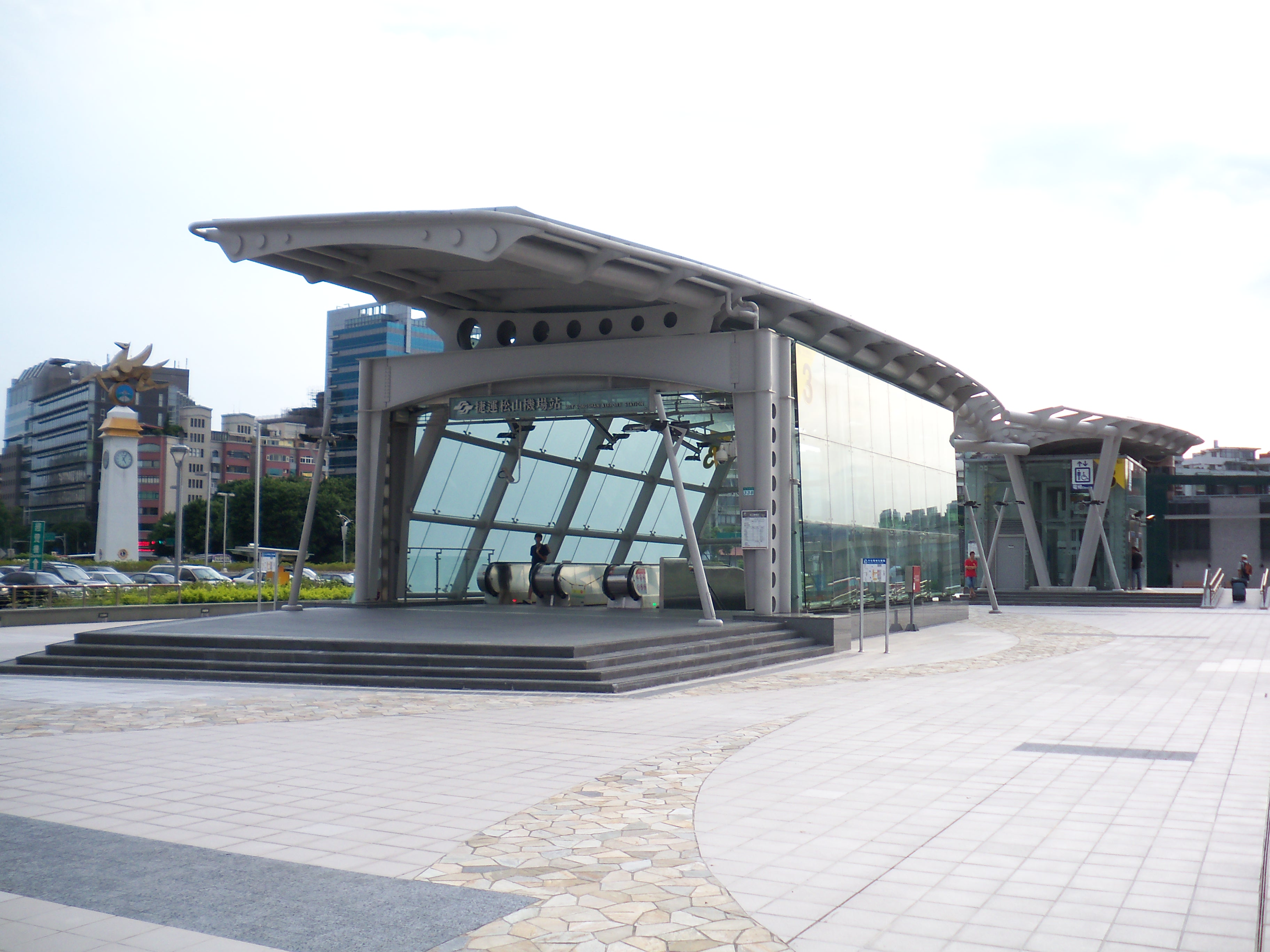 台北捷運内湖線松山機場駅3号出口。